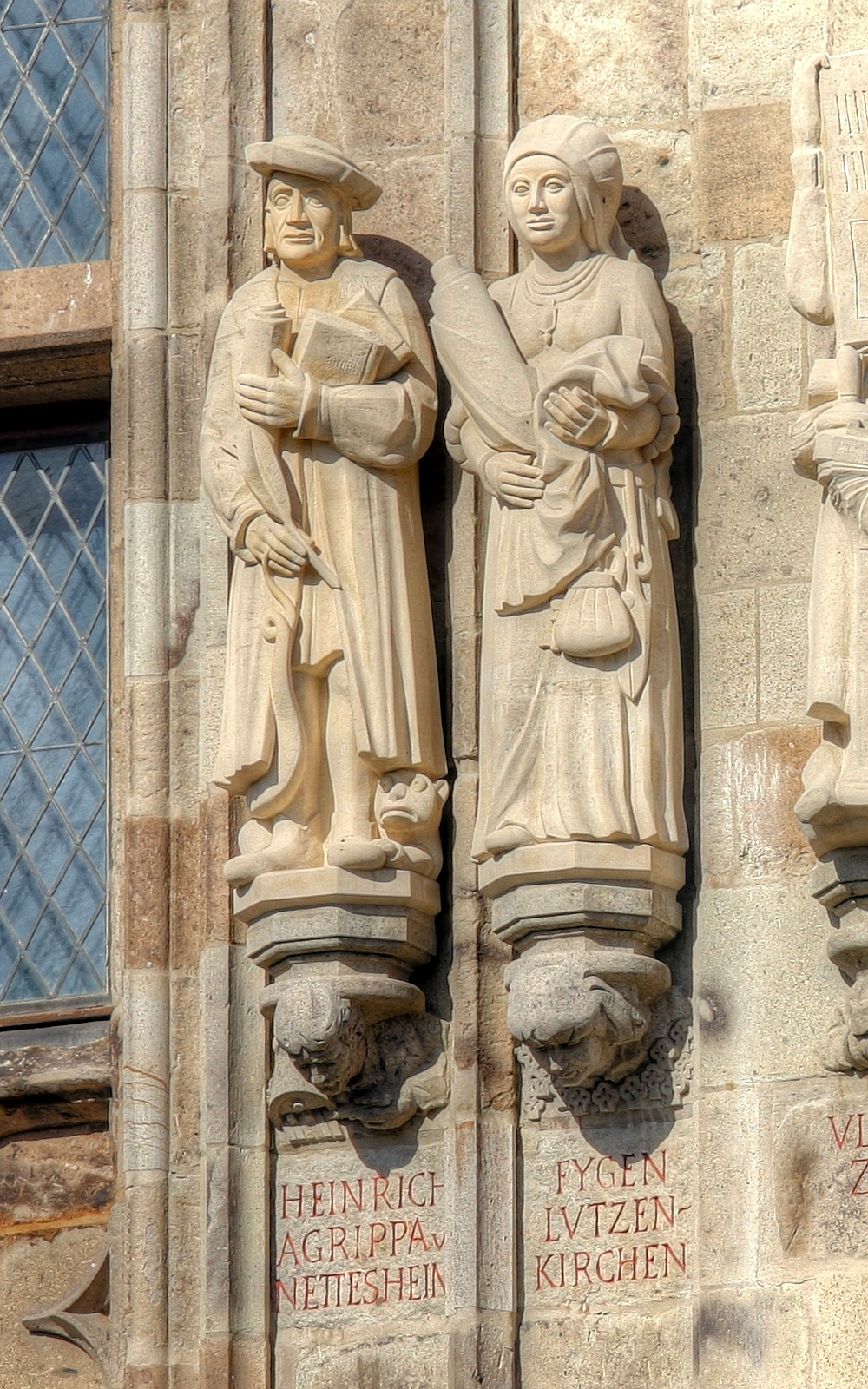 Rathausturm Köln mit den Figuren des Heinrich Cornelius Agrippa von Nettesheim und der Fygen Lutzenkirchen Details zu der Statue: Bildhauer der Nettesheim-Statue: Wolfgang Reuter Bildhauer der Lutzenkirchen-Statue: Wolfgang Reuter Details zu der Konsole: Thema der Konsole unter der Agilolf-Statue: „Dr. Ulrich Krings“. Bildhauer: Heribert Calleen Thema der Konsole unter der Lutzenkirchen-Statue: „Prof. Dr. Hiltrud Kier“. Bildhauer: Heribert Calleen